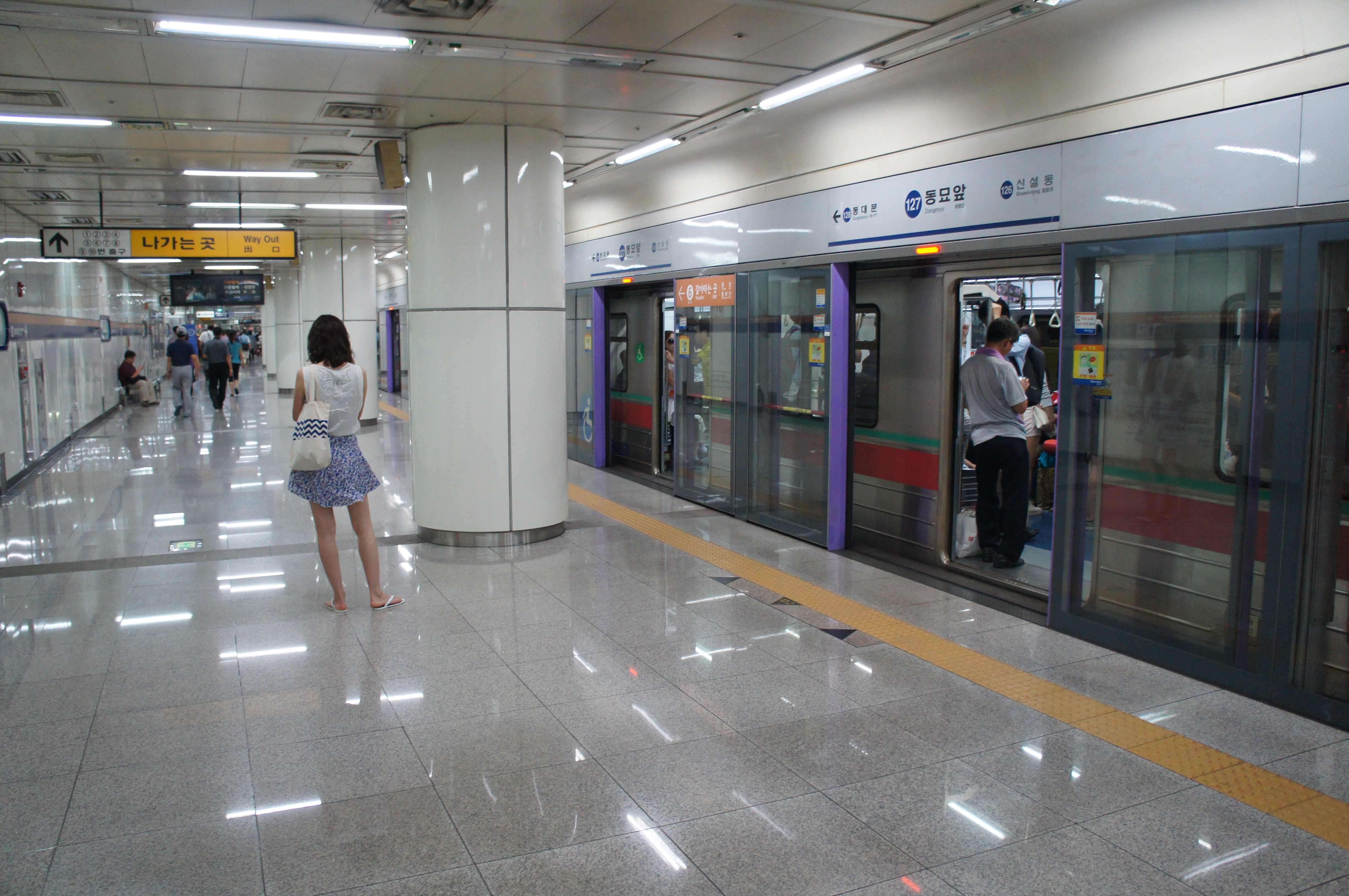 1호선 동묘앞역 승강장